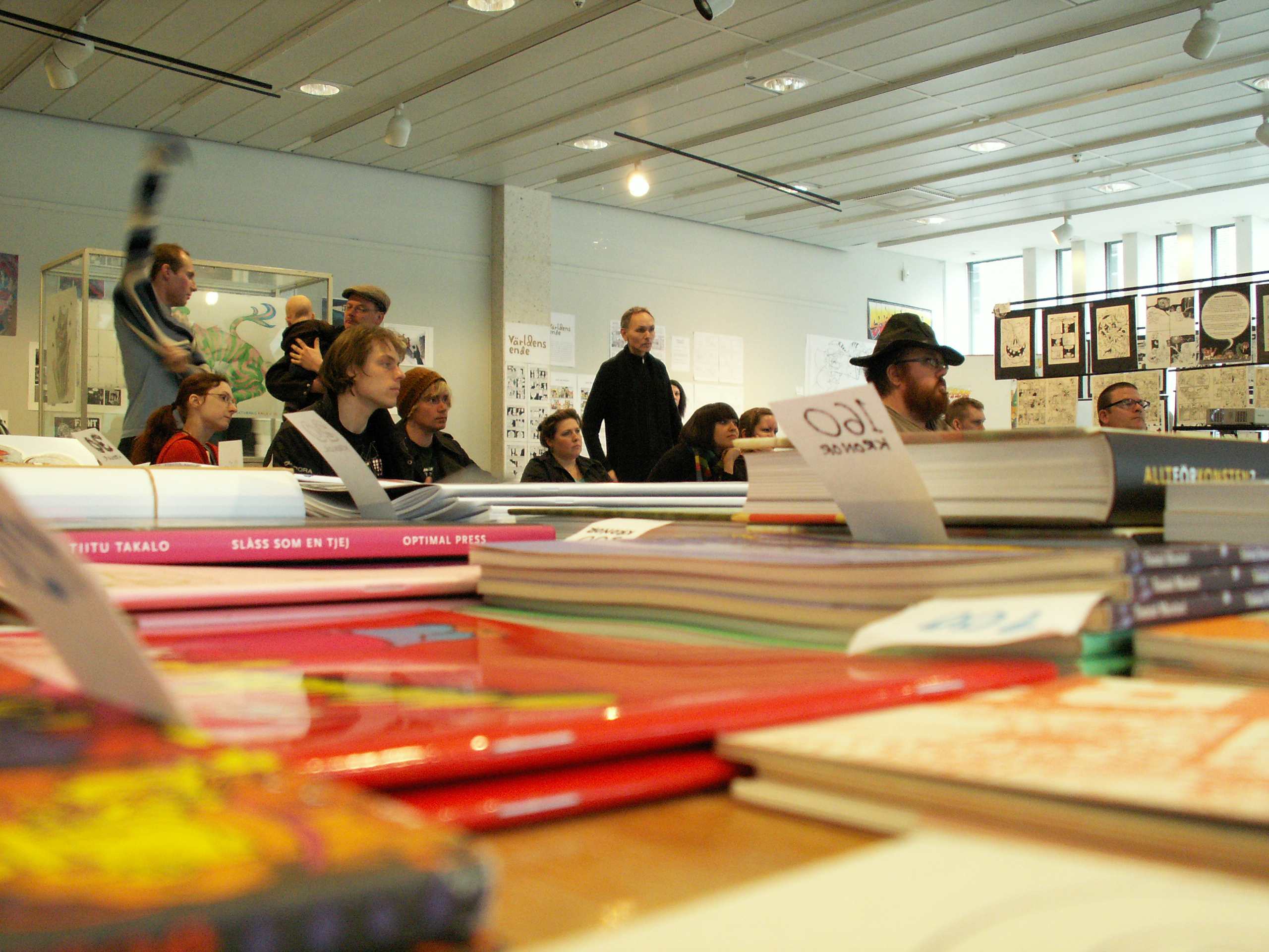 Bild från Göteborgs stadsbibliotek under Serieveckan 2010, en vecka med utställningar, filmvisningar, föredrag (som här) och annat serierelaterat.